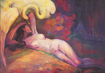 “Leda”, Jazinto Olabe